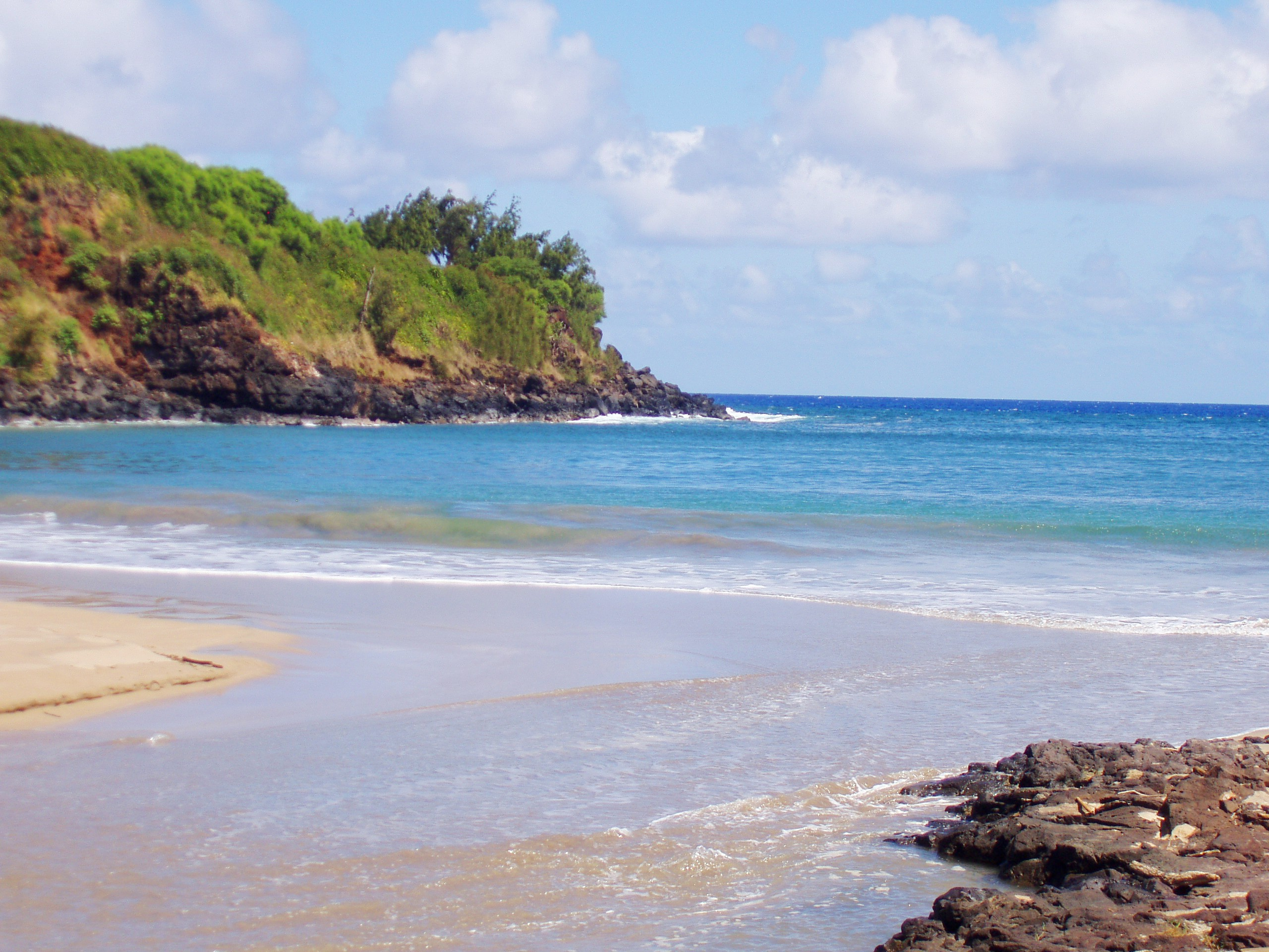 Allerton Garden, Kauai, Hawaii - Lawai Bay.